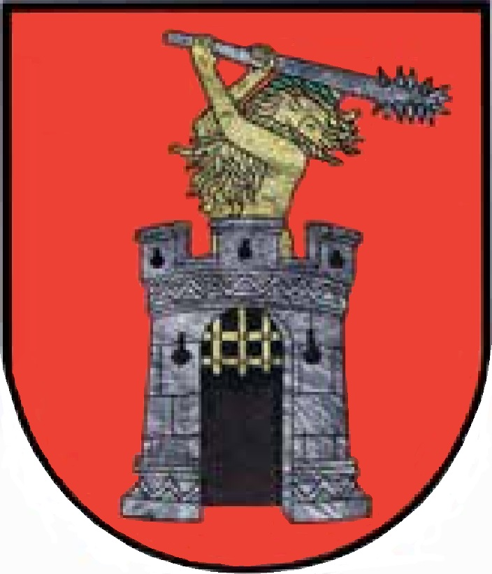 „In rotem Schild silbern ein gemauerter, schwarz gefugter Turm mit drei je von einer Schlüsselscharte schwarz durchbrochenen Zinnen und schwarz durchbrochenem, von je einer schwarz durchbrochenen Schlüsselscharte beseiteten Rundbogentor samt hochgezogenem goldenem Fallgitter. Aus dem Turm wachsend ein goldener langbärtiger Wilder Mann mit aufgesetztem, grün geflochtenem Kranz im krausen Haar, mit beiden Händen über sich einen silbernen, spitzenbewehrten Streitkolben zum Schlag führend.“